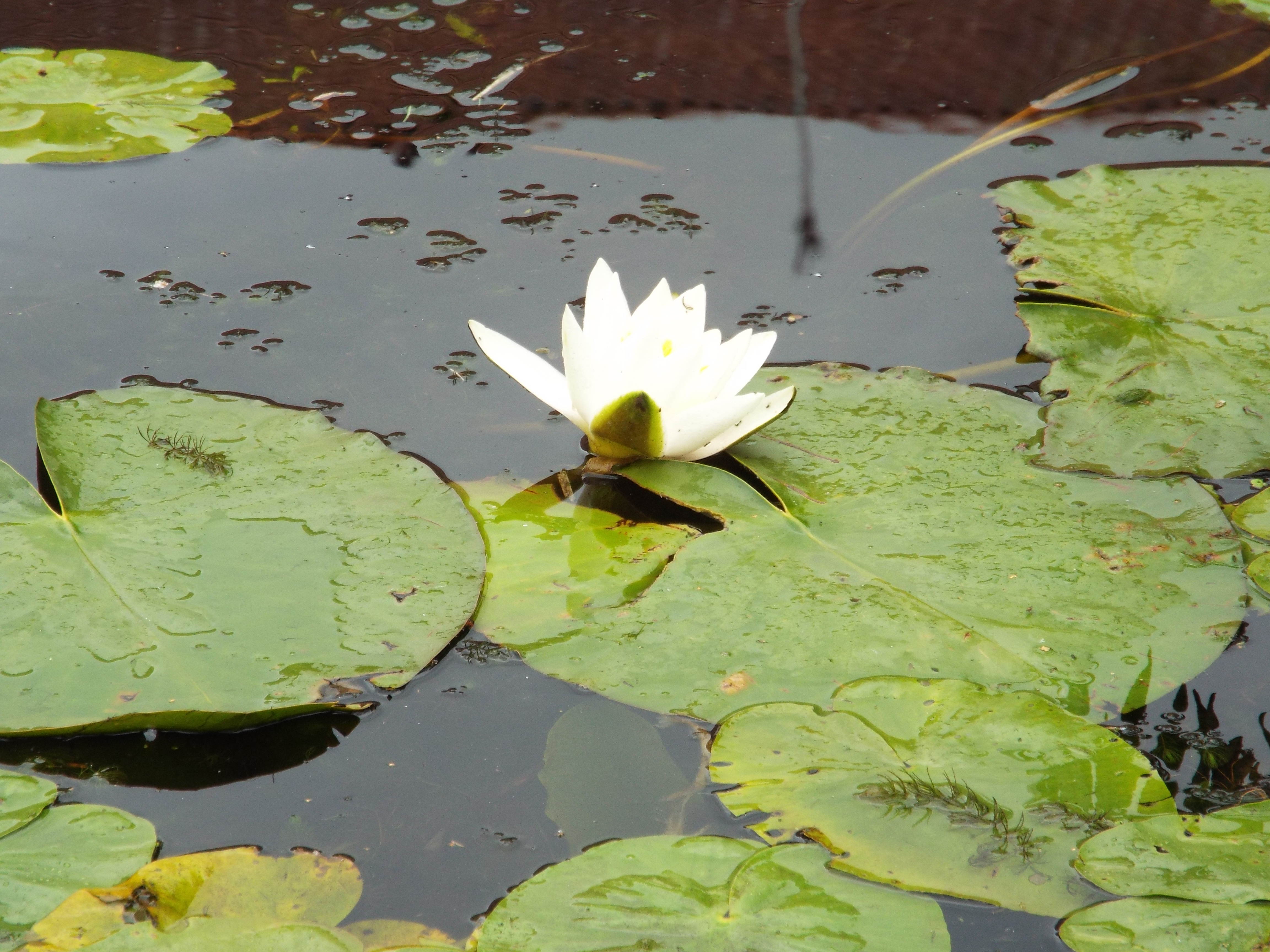 Латаття біле на протоці Туга в Новому Дворі Гданському. Фото Івана Парнікози, 2019 р.